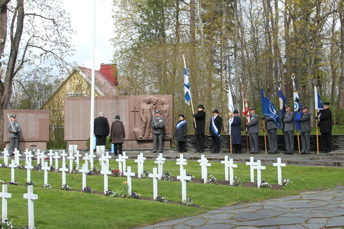 Kaatuneitten muistopäivä Vihdin kirkon sankarihautausmaalla, Vihti 17.5.2020